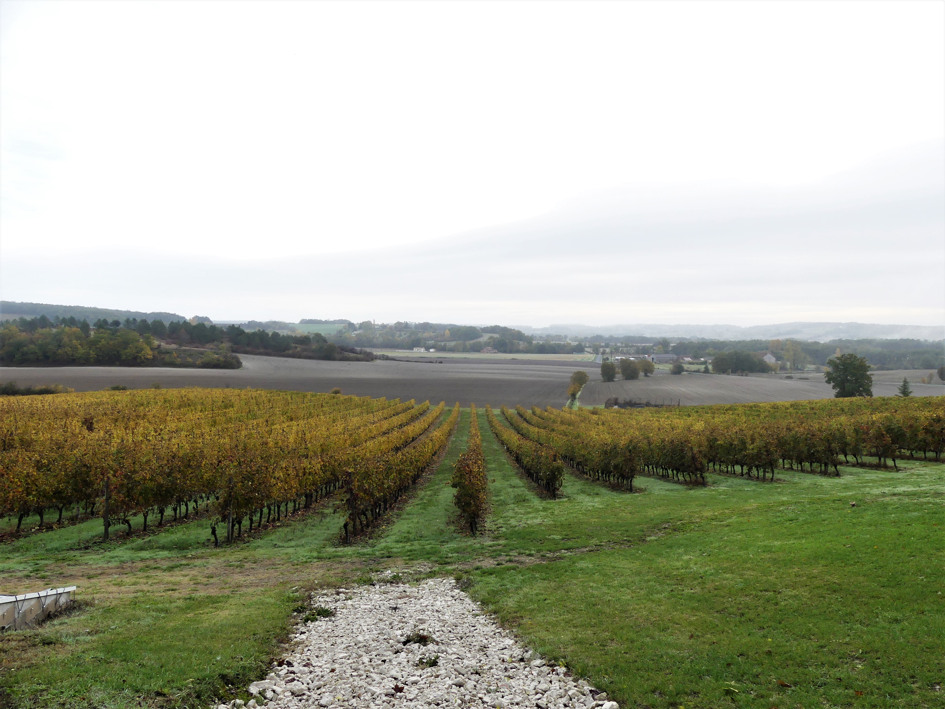 Vignes à Saint-Julien-d'Eymet, Dordogne, France.